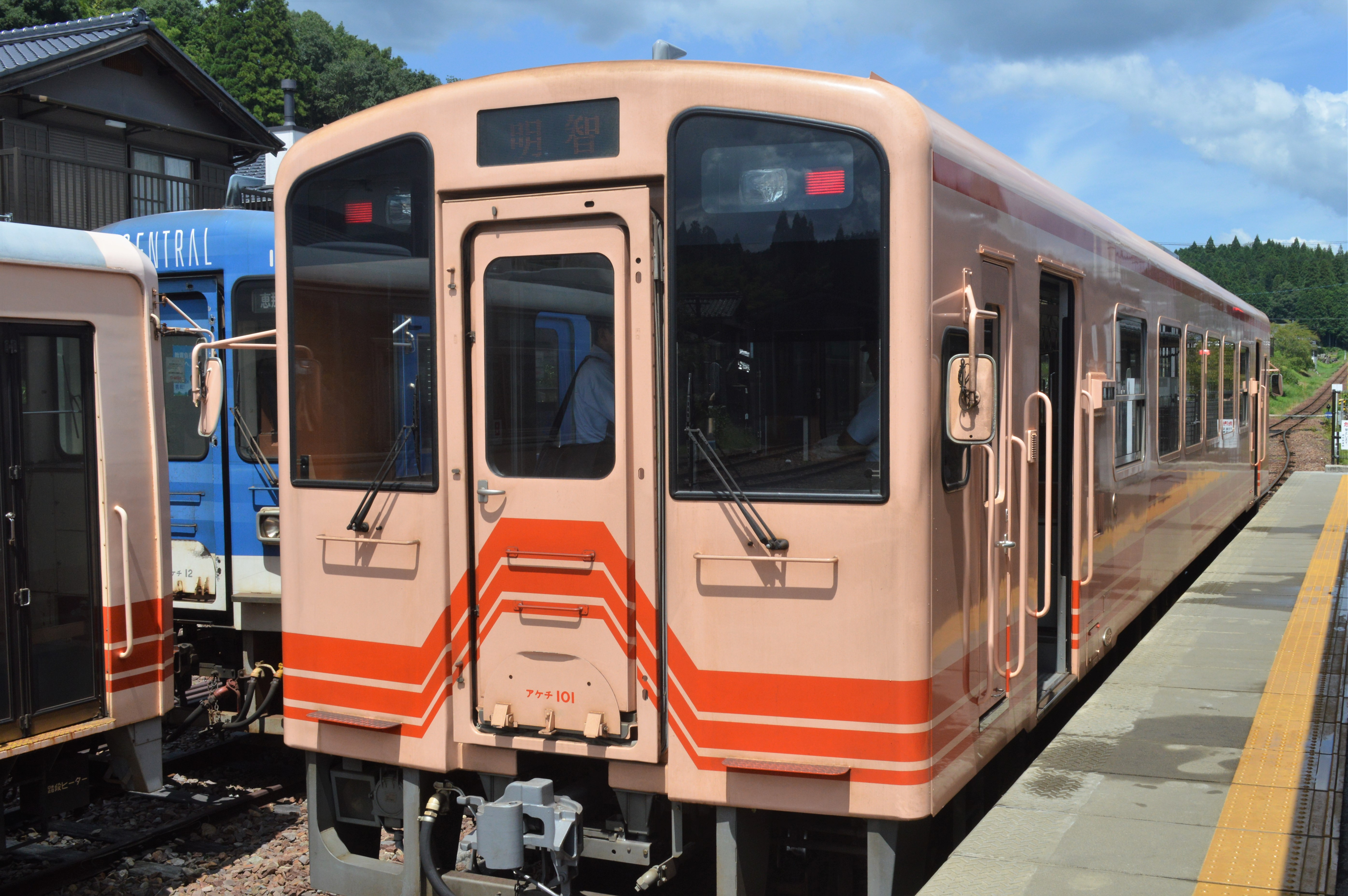 明知鉄道アケチ100形気動車。